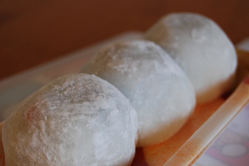 happy daifuku trio